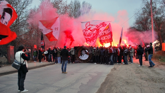 Проход болельщиков "Спартака" в Самаре. 2009 год